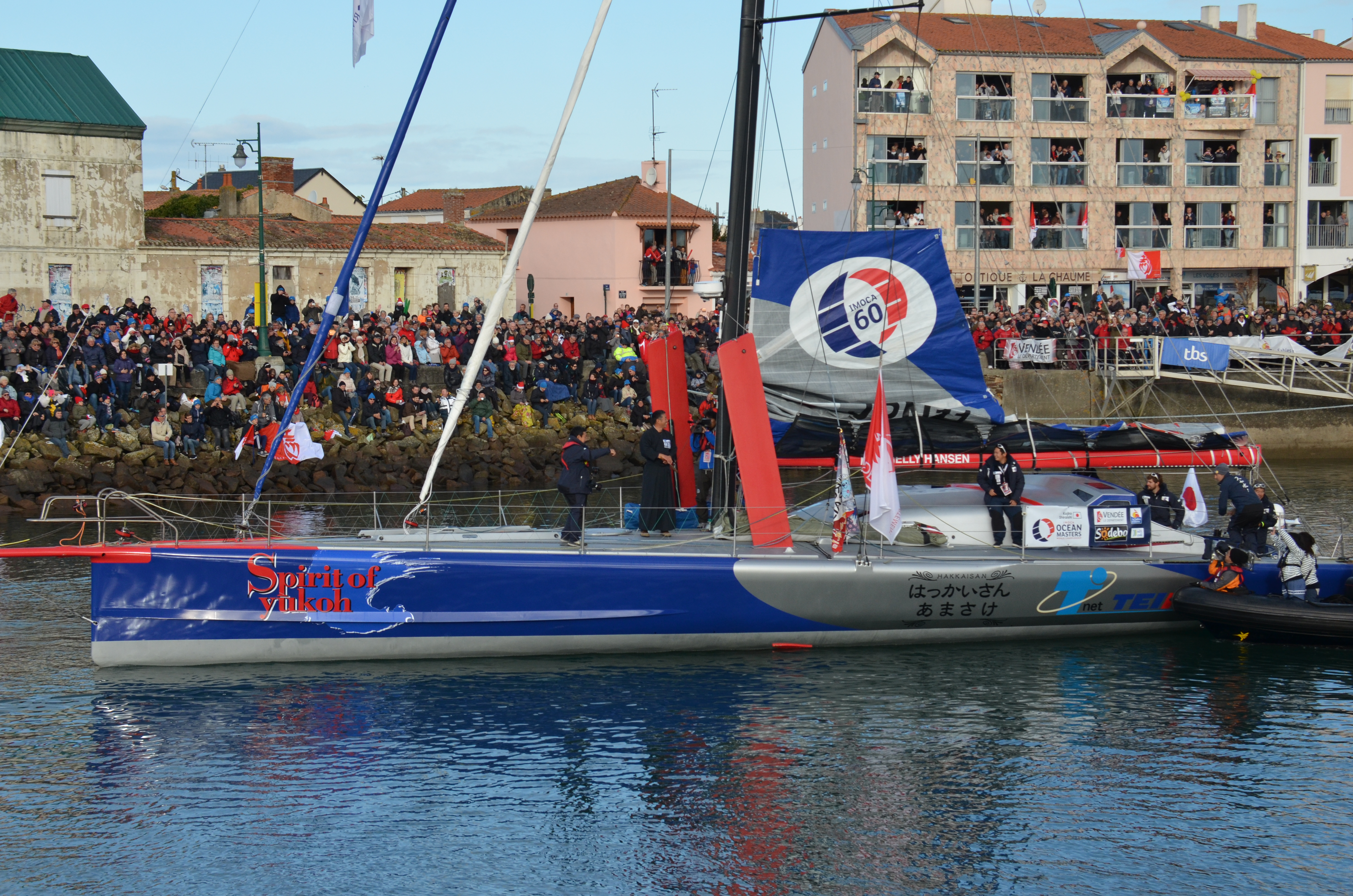 Kojiro Shiraishi au départ du Vendée Globe 2016